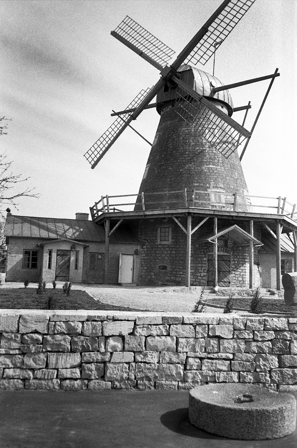 Saaremaa Veski restoran 74